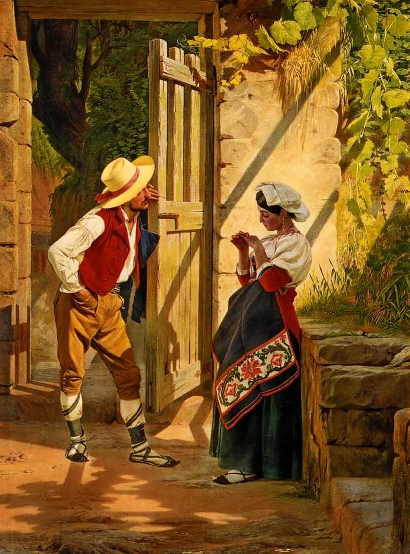 Сорокин Евграф Семенович. Свидание. 1858